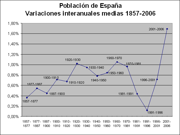 Gráfico de líneas en el que se muestran las variaciones interanuales medias de la población española entra 1857 y 2006. Las variaciones interanuales medias para cada periodo se han calculado a partir de los tamaños de la población de España en los censos que delimitan el periodo considerado, de aproximadamente 10 años salvo para el perido 1857-1877 y los tres últimos periodos (de 5 años).